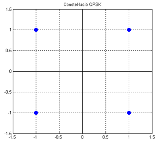 Const QPSK